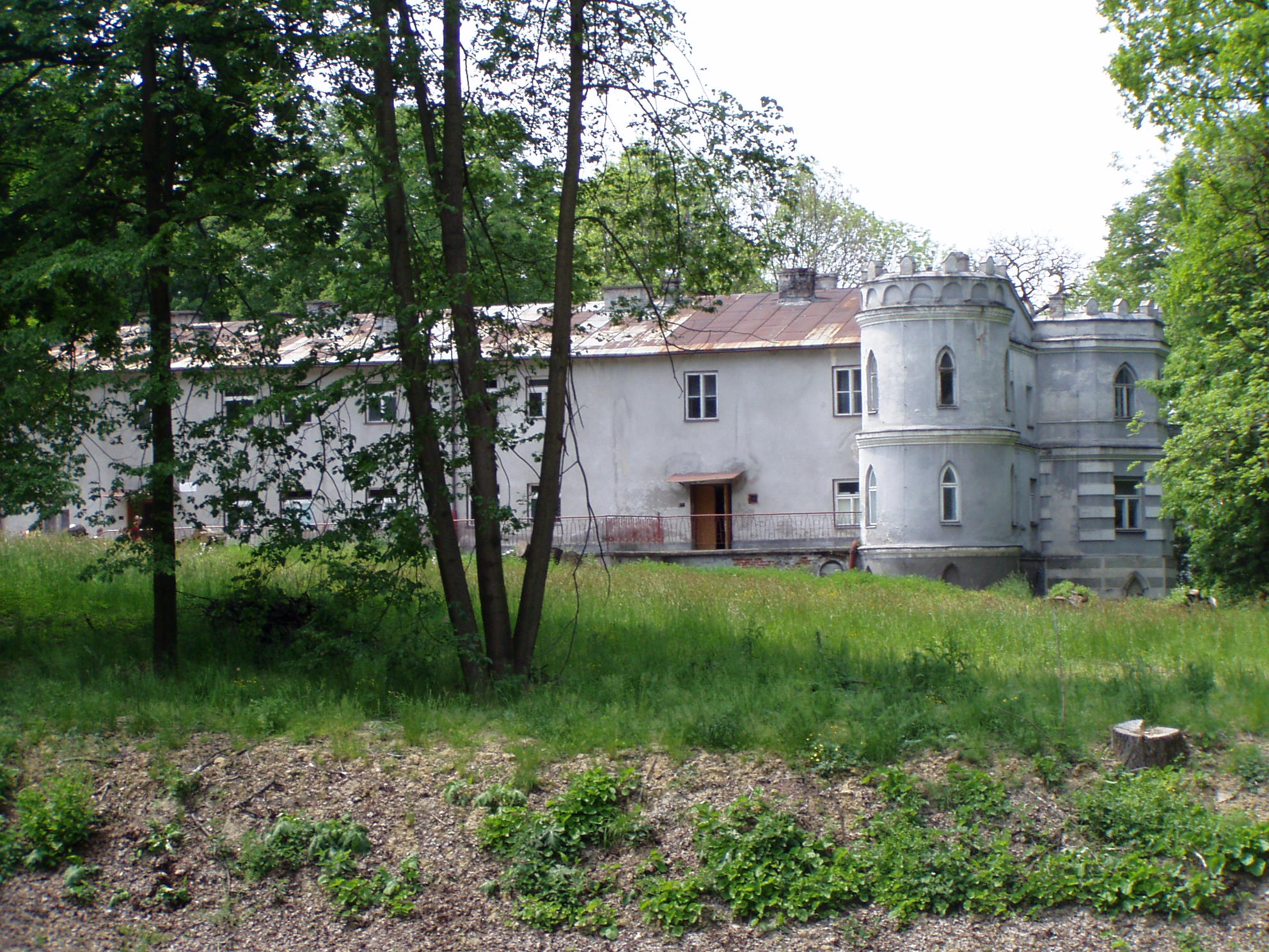 Pałac w Birczy. Widok od strony wschodniej, zza stawu.